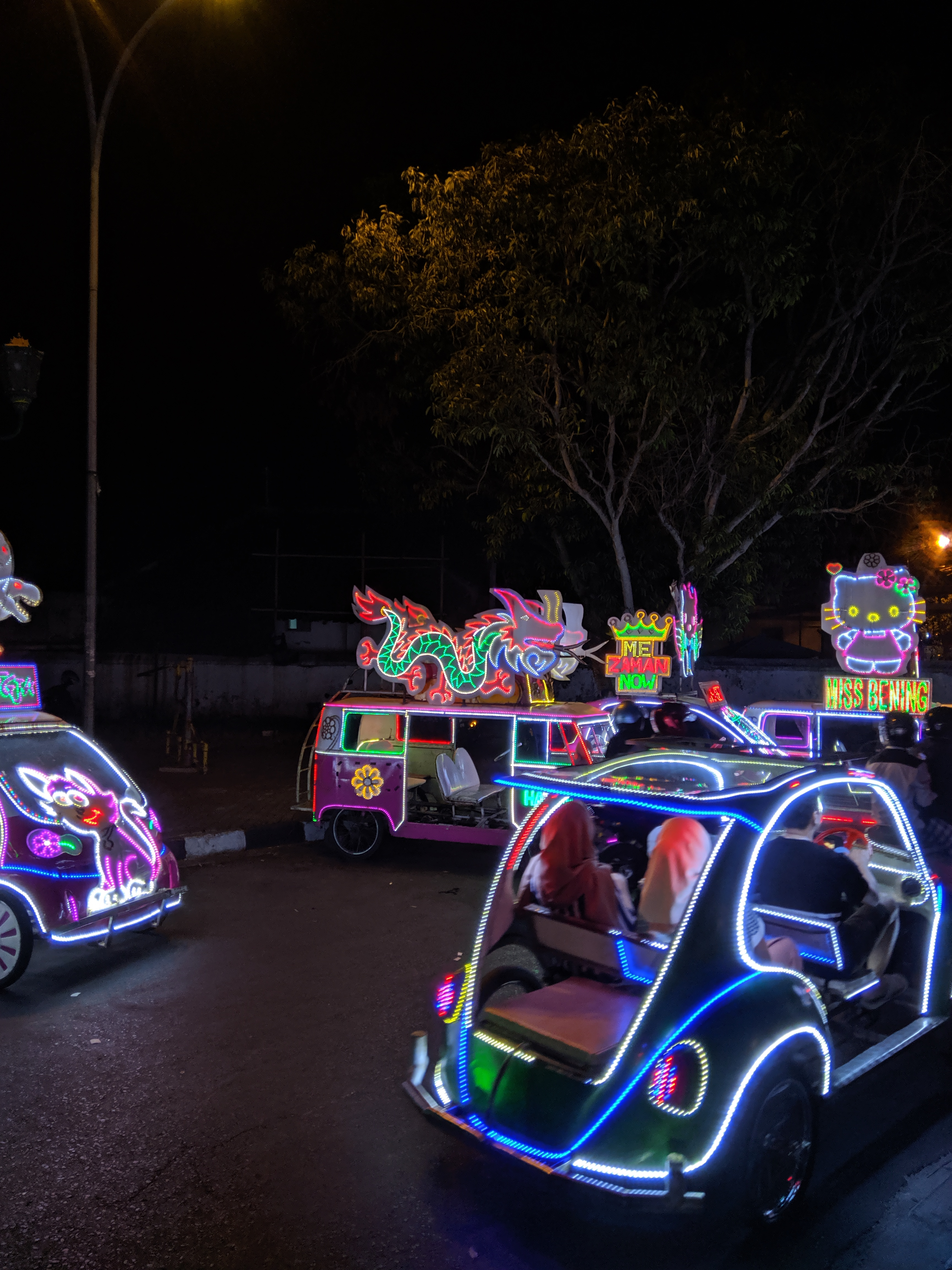 Becak cinta alun-alun Kidul, Yogyakarta